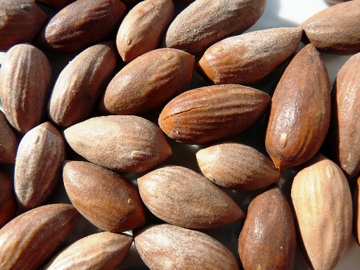 Nusseibe Früchte